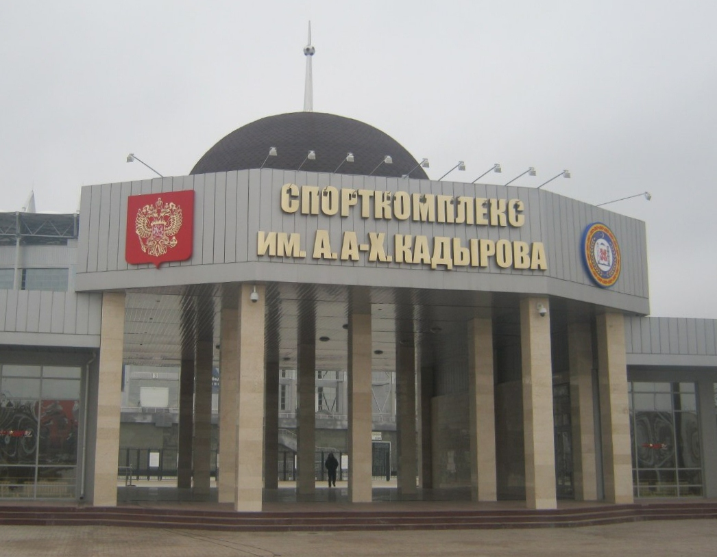 Ахмат-Арена